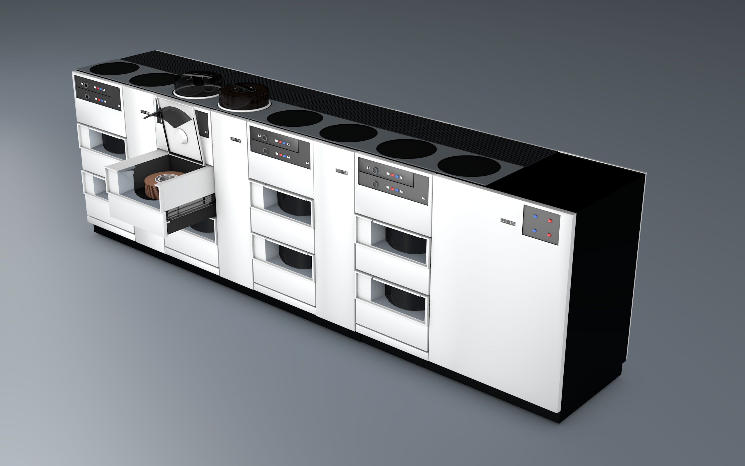 IBM magnetic disk drives 3330+3333